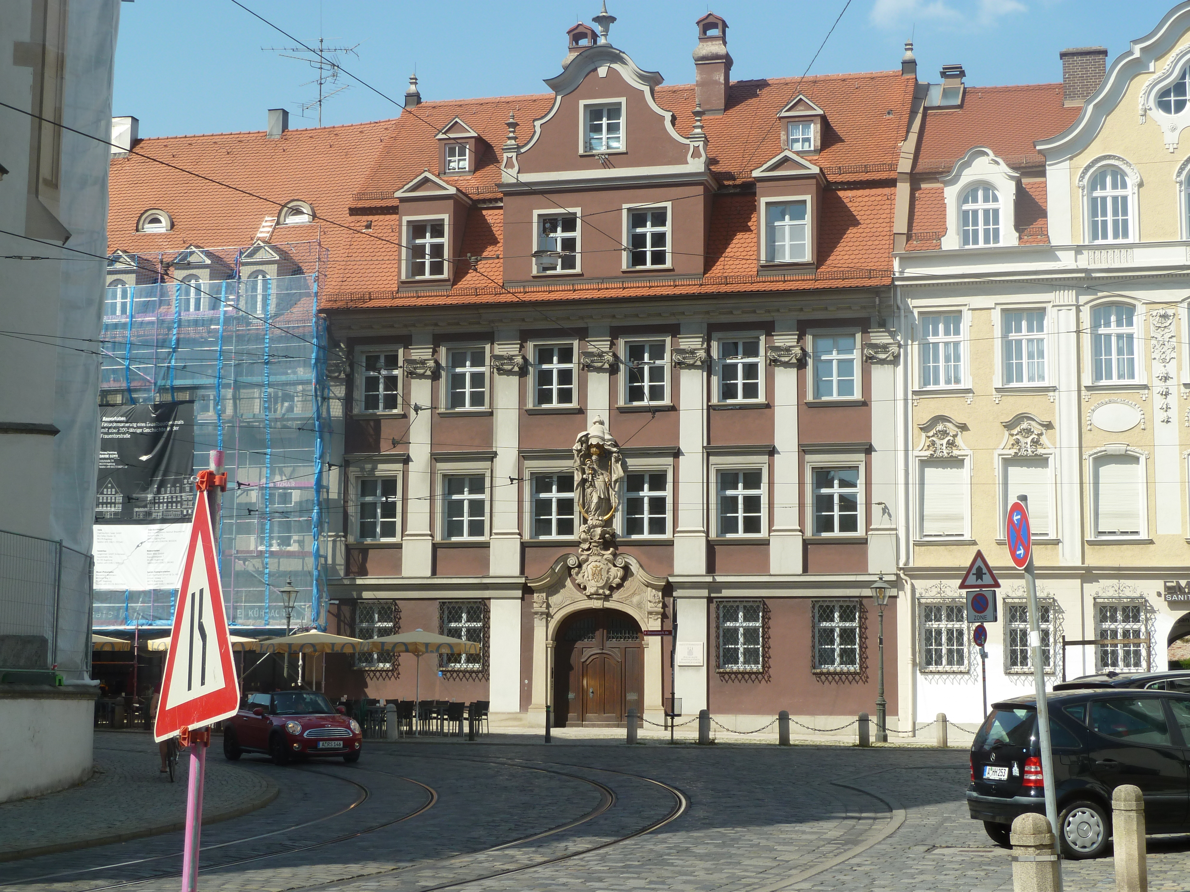 Hohenleitner Haus, seit 1496 Domherrenhaus, umgebaut 1755 im Rokokostil